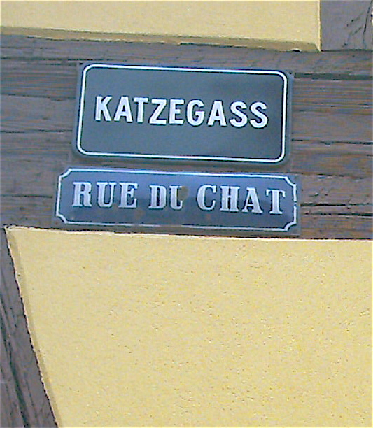 Erstein (France) : Plaque de rue (français/alsacien)